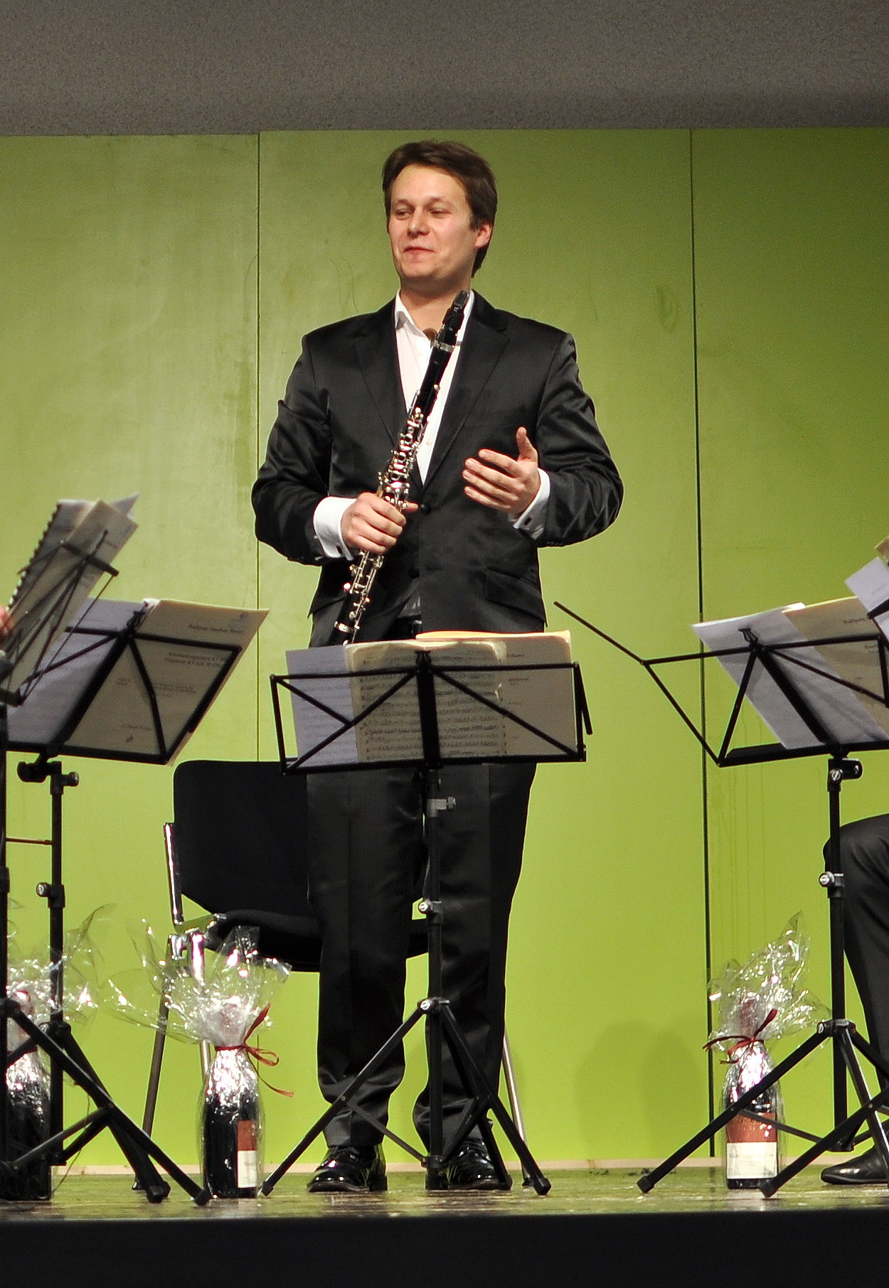 Danish String Quartet und Sebastian Manz, Klarinette, beim Quartettfest des Heidelberger Frühlings, 24. Januar 2013